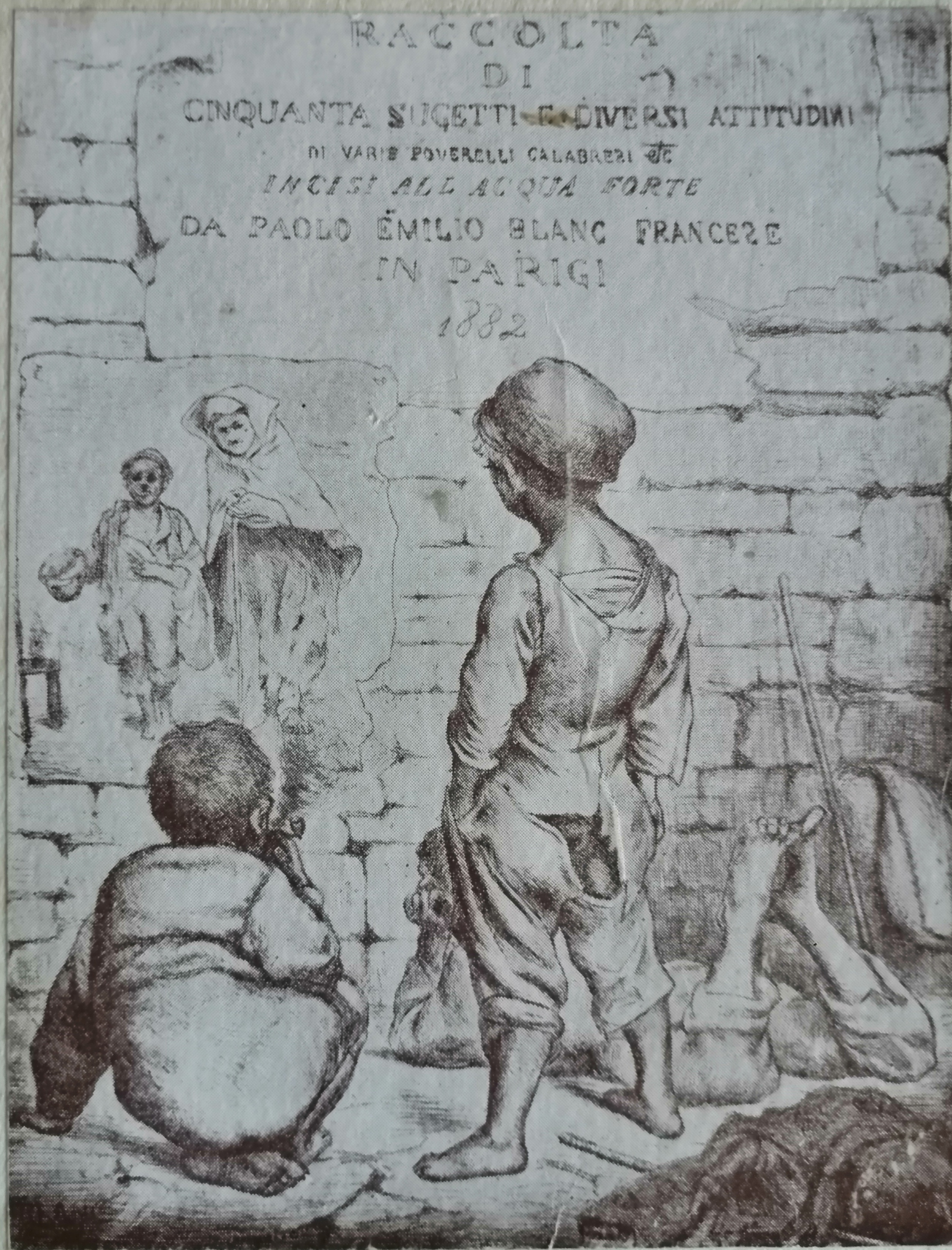 Paul Blanc, projet de couverture pour un recueil de gravures. Eau-forte, 23,5 x 29,5